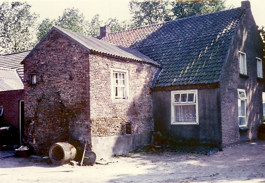 Boerderij 't Hof 2 te Lieshout met daarin opgenomen de noordelijke dwarsbeuk van een middeleeuwse kerk.